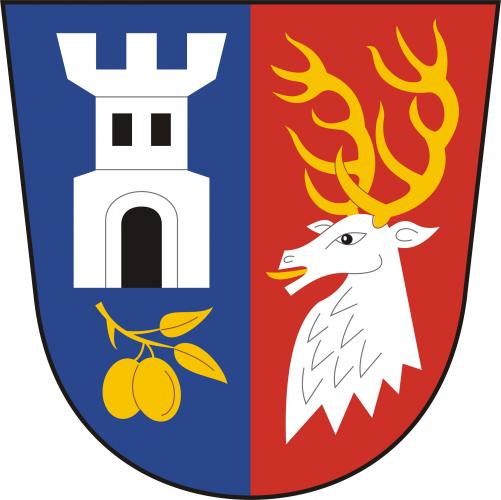 Budíškovice znak